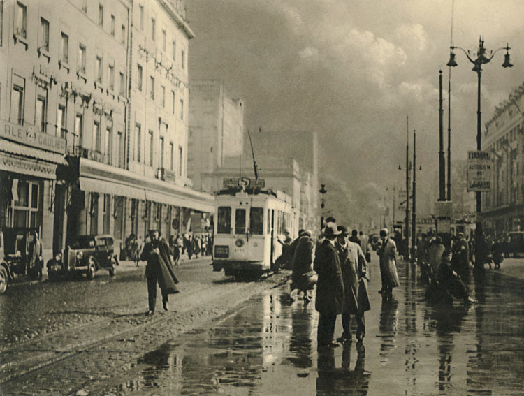 Брюссельская улица с трамваем в дождливый день